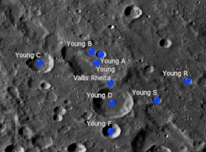 Cráter lunar Young. Cráteres satélite. (Imagen LRO)